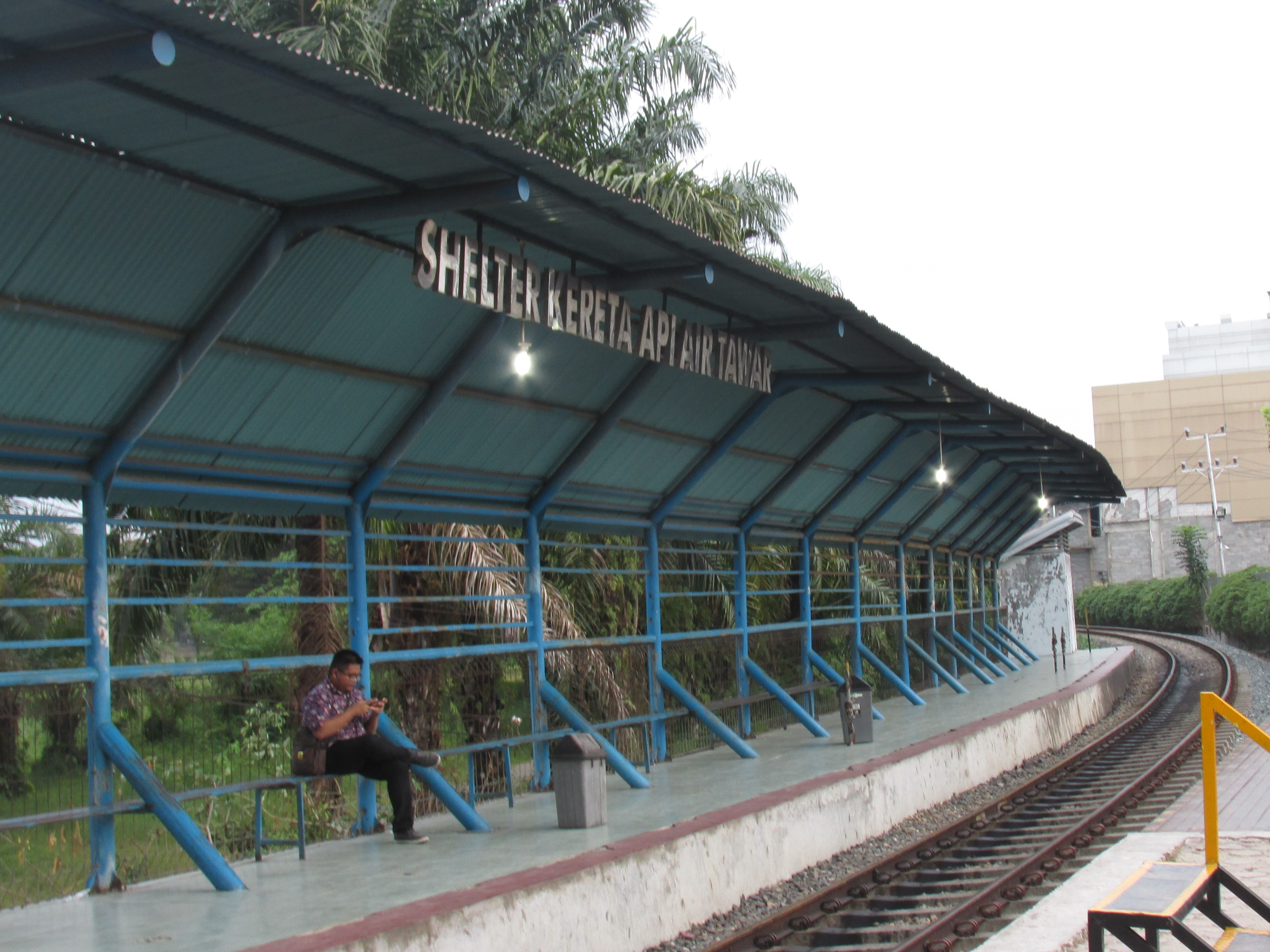 Selter Air Tawar kereta